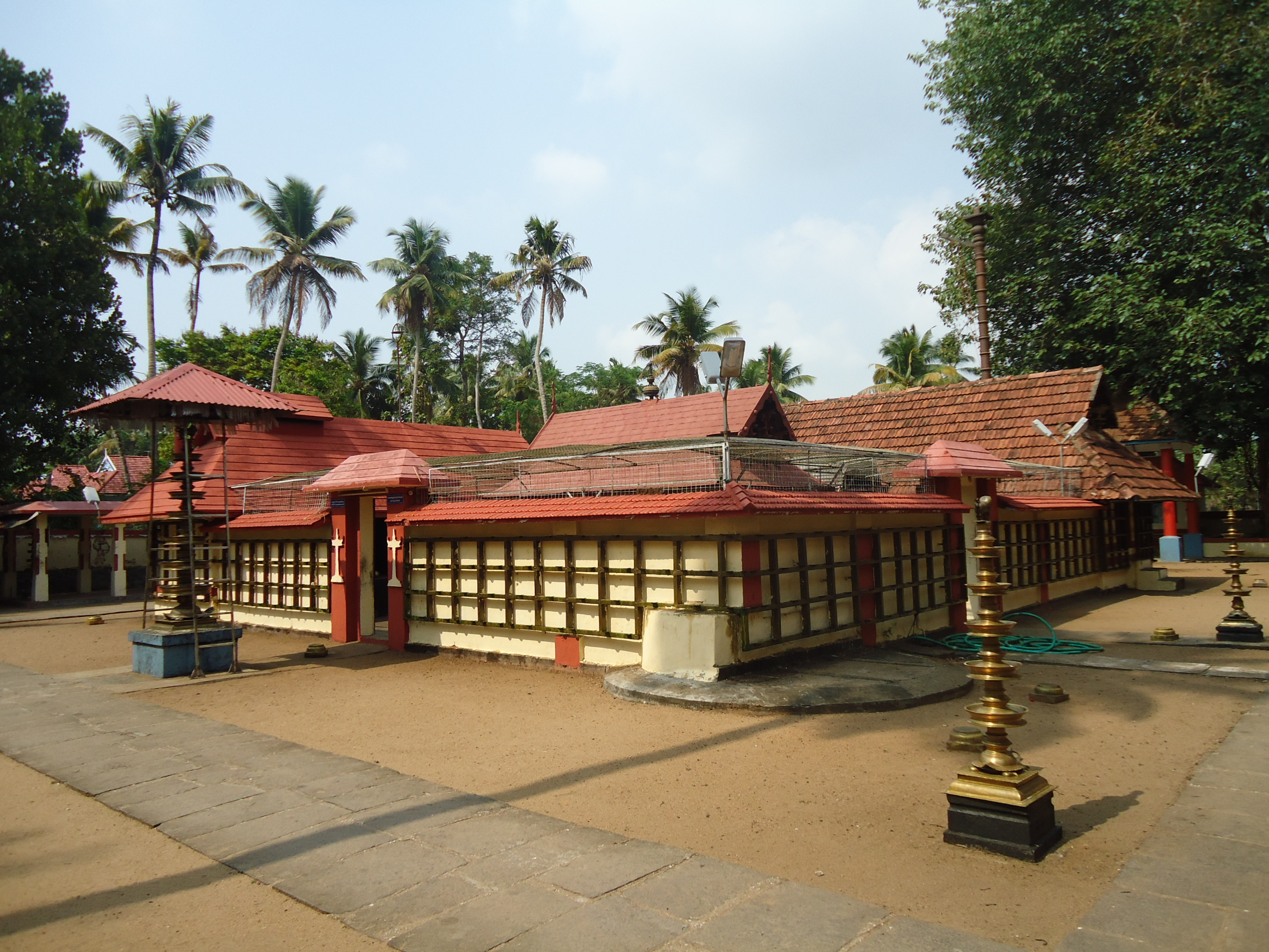 Kothakulangara Sree Bhagavathi Temple Angamaly Side View